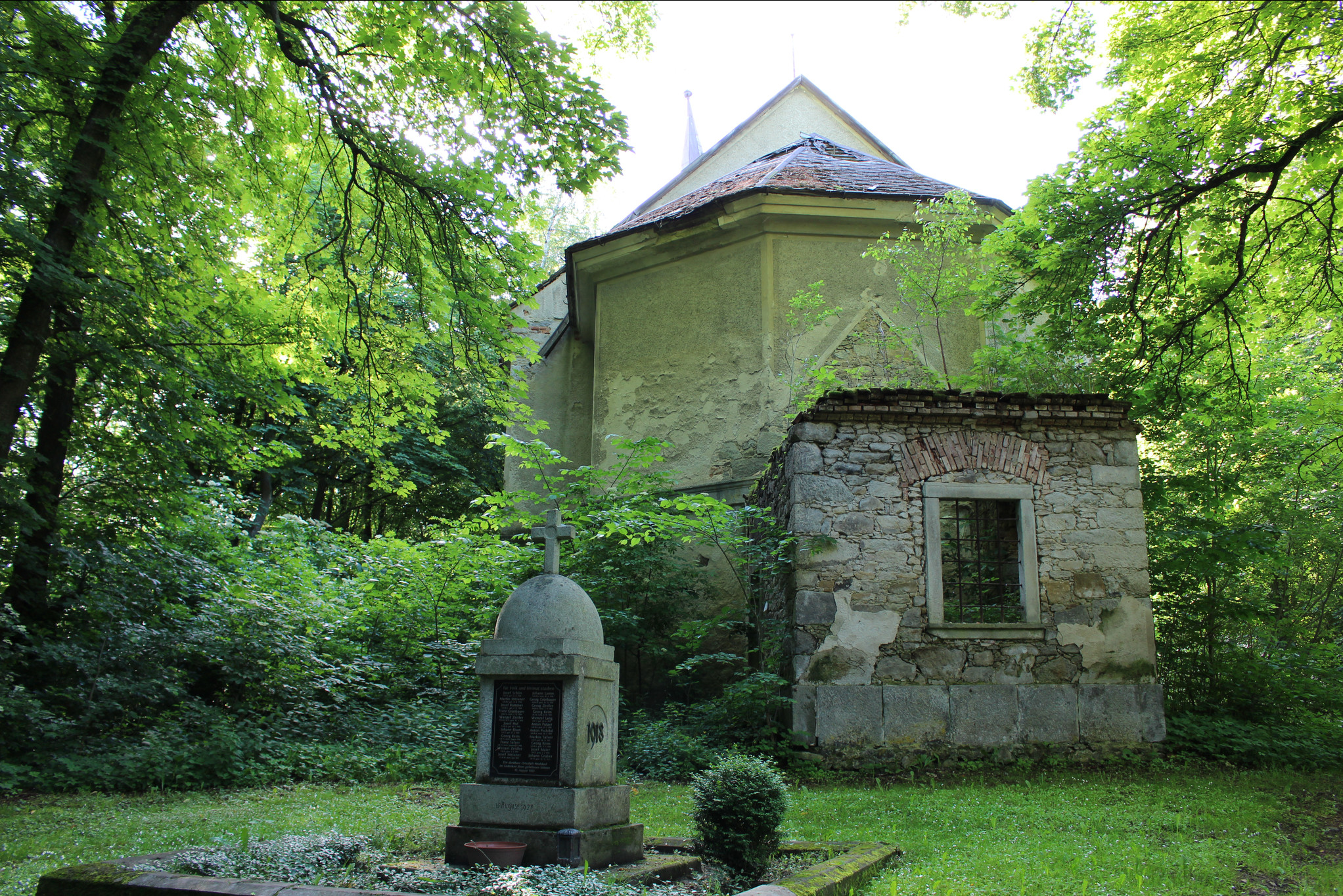 Nové Domky, část obce Rozvadov, okres Tachov, Plzeňský kraj, památník 1. světové války u kostela Navštívení Panny Marie